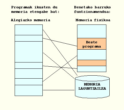 Alegiazko memoria kudeketaren irudikapena